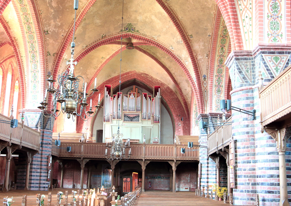 Innenraum der Plauer Marienkirche